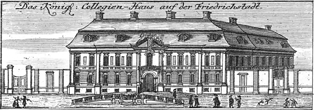 Aus Schleuens Berliner Plan von 1757 entnommen